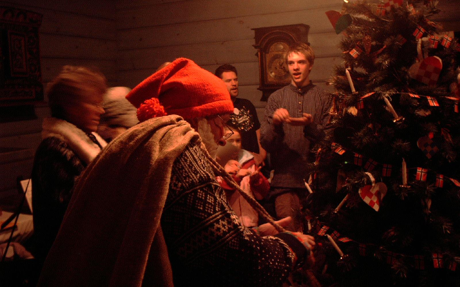 Tradisjonell norsk julaften med utkledt nisse i lusekofte og nisselue, julesanger og juletregang ved Vesterheim Norwegian-American Museum i Iowa i USA. Original caption: Celebrating Christmas with a traditional song about the julenisse (the Yule elf) at the Vesterheim Norwegian-American Museum in Decorah, Iowa.Julenisse song